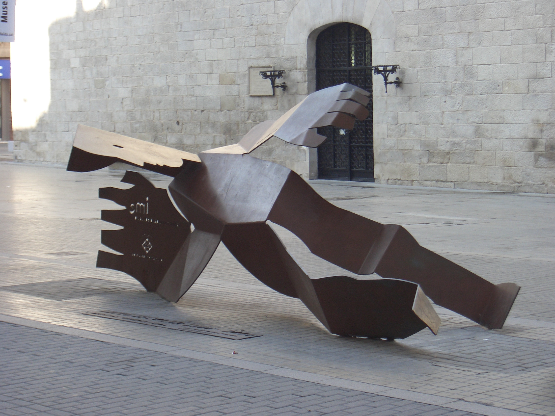 Escultura en honor el 48 nens que van morir al bombardeig del Liceo Escolar de Lleida, situada a l'avinguda Blondel de Lleida